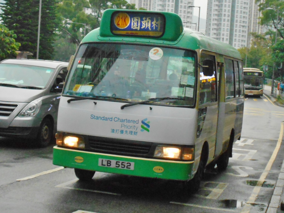 中文（香港）: 新界專線小巴21K線，正駛經寶鄉街前往圍頭村